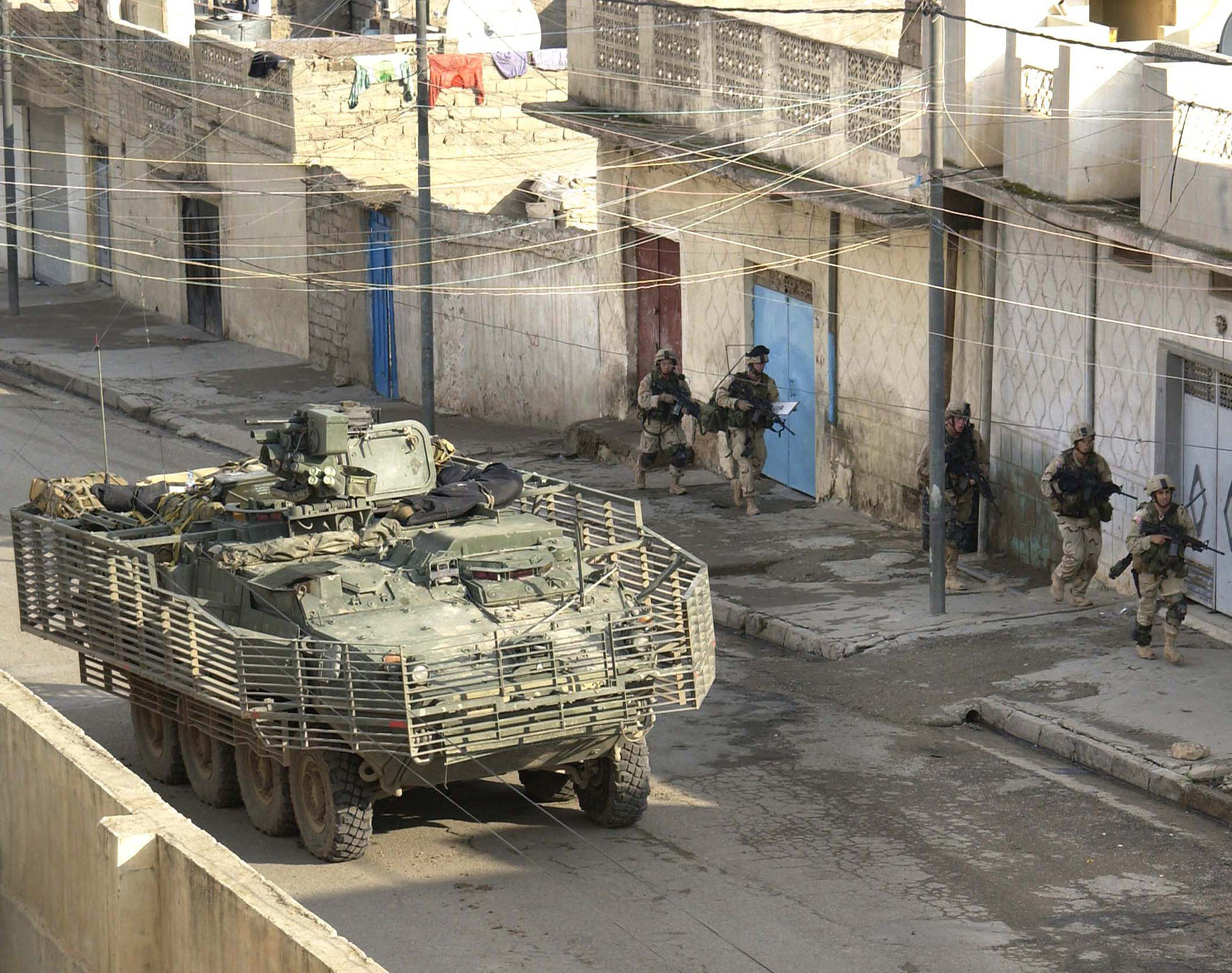 1. brigada, 25. pehotna divizija (lahka) (SBCT), 11. november 2004, operacija Indy, Mosul, Irak.